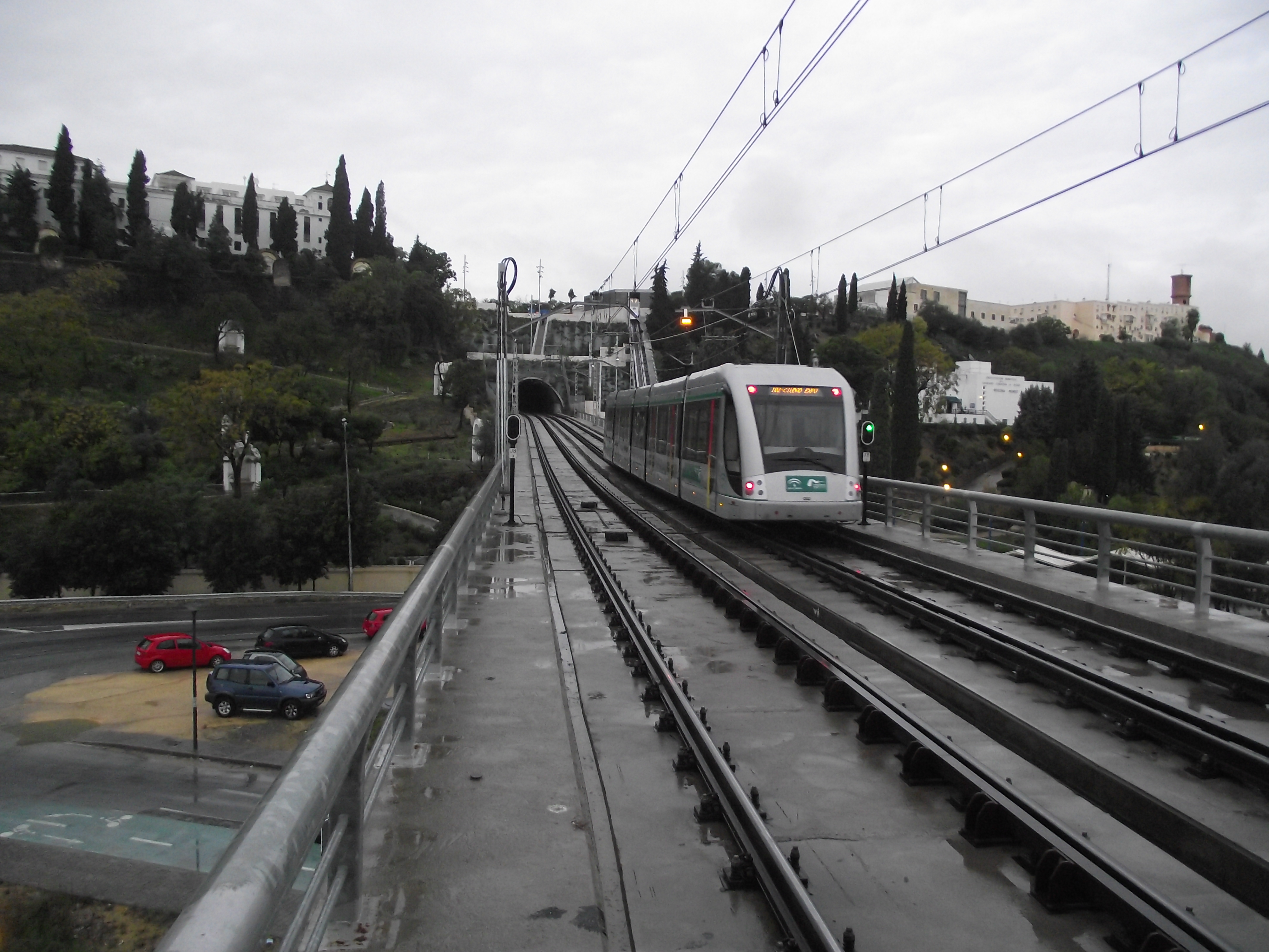 Metro op viaduct bij de halte San Juan Bajo